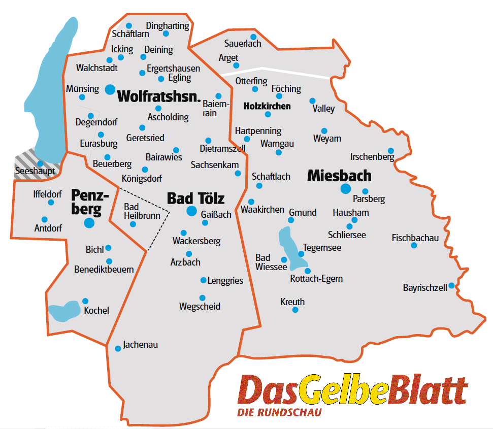 Verbreitungsgebiet Das Gelbe Blatt